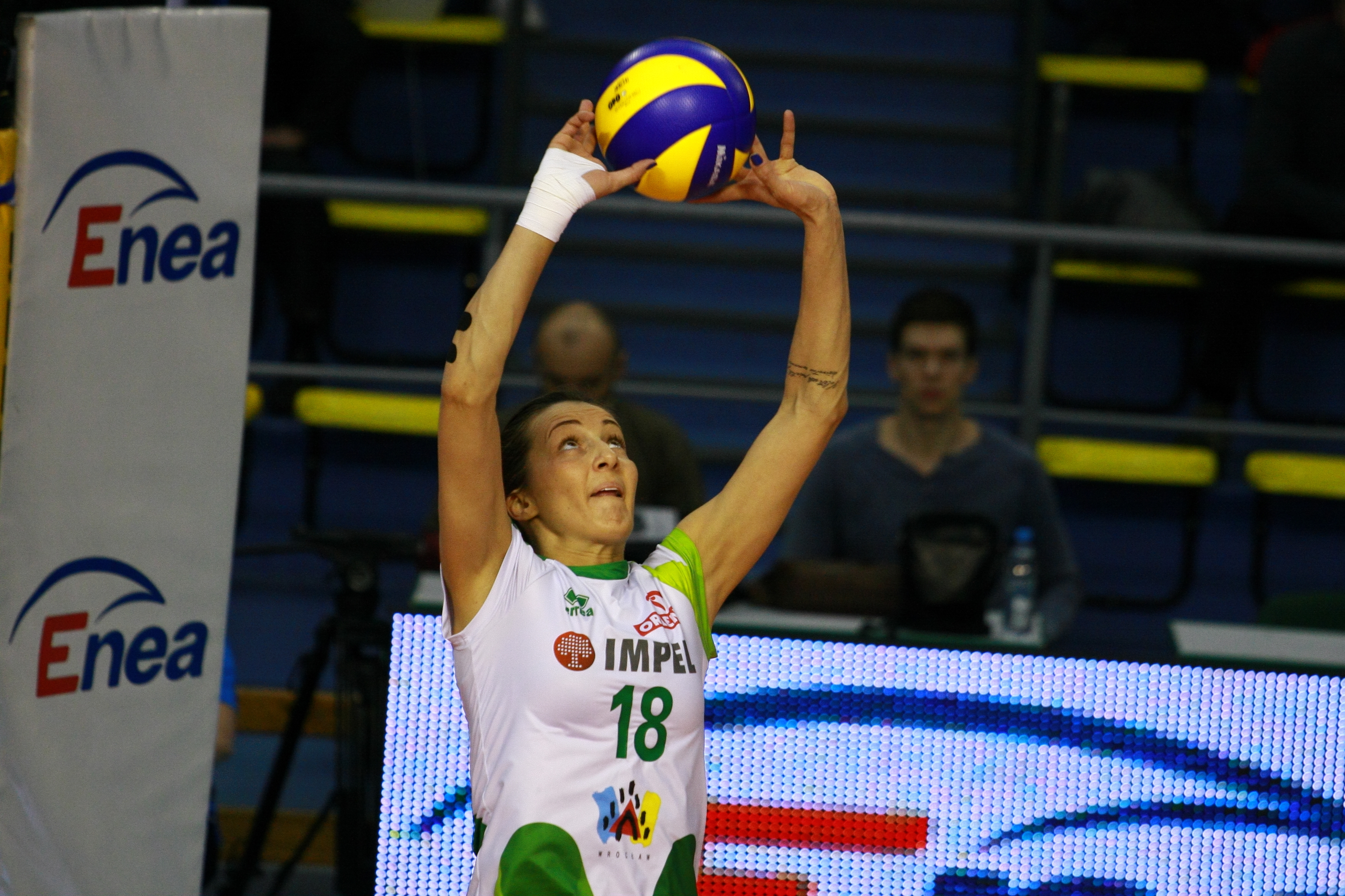 Atom Trefl Sopot Bank BPS Muszynianka Fakro Muszyna Tauron MKS Dąbrowa Górnicza Impel Gwardia Wrocław